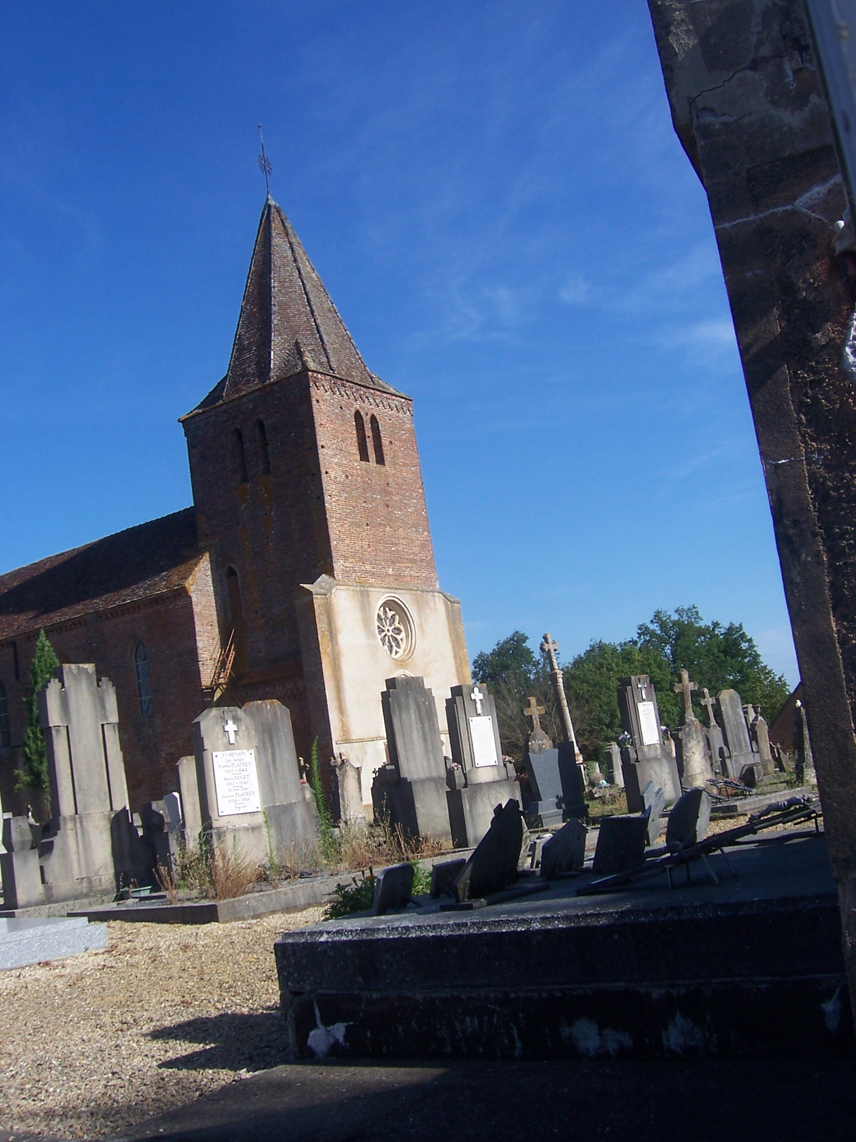 Eglise de Ménetreuil